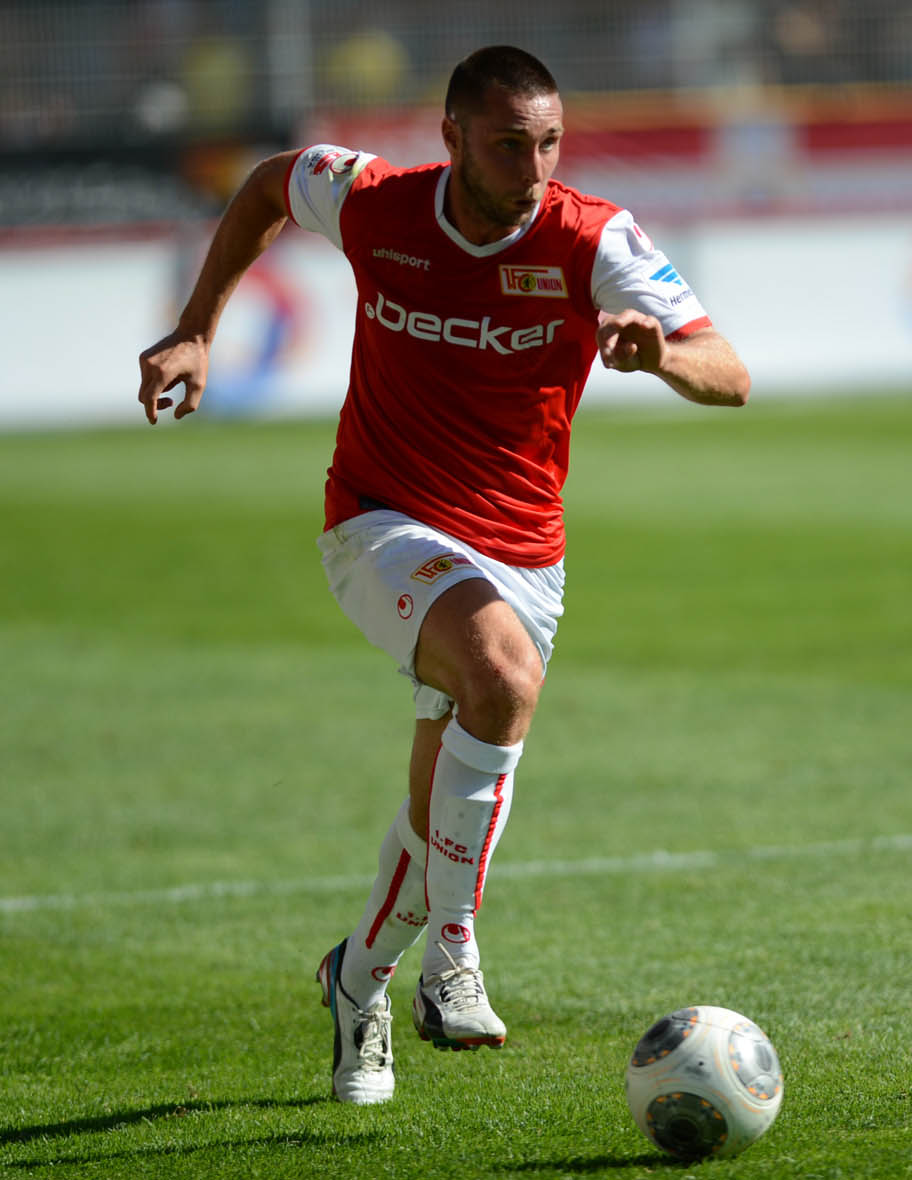 Marc Pfertzel beim Antritt